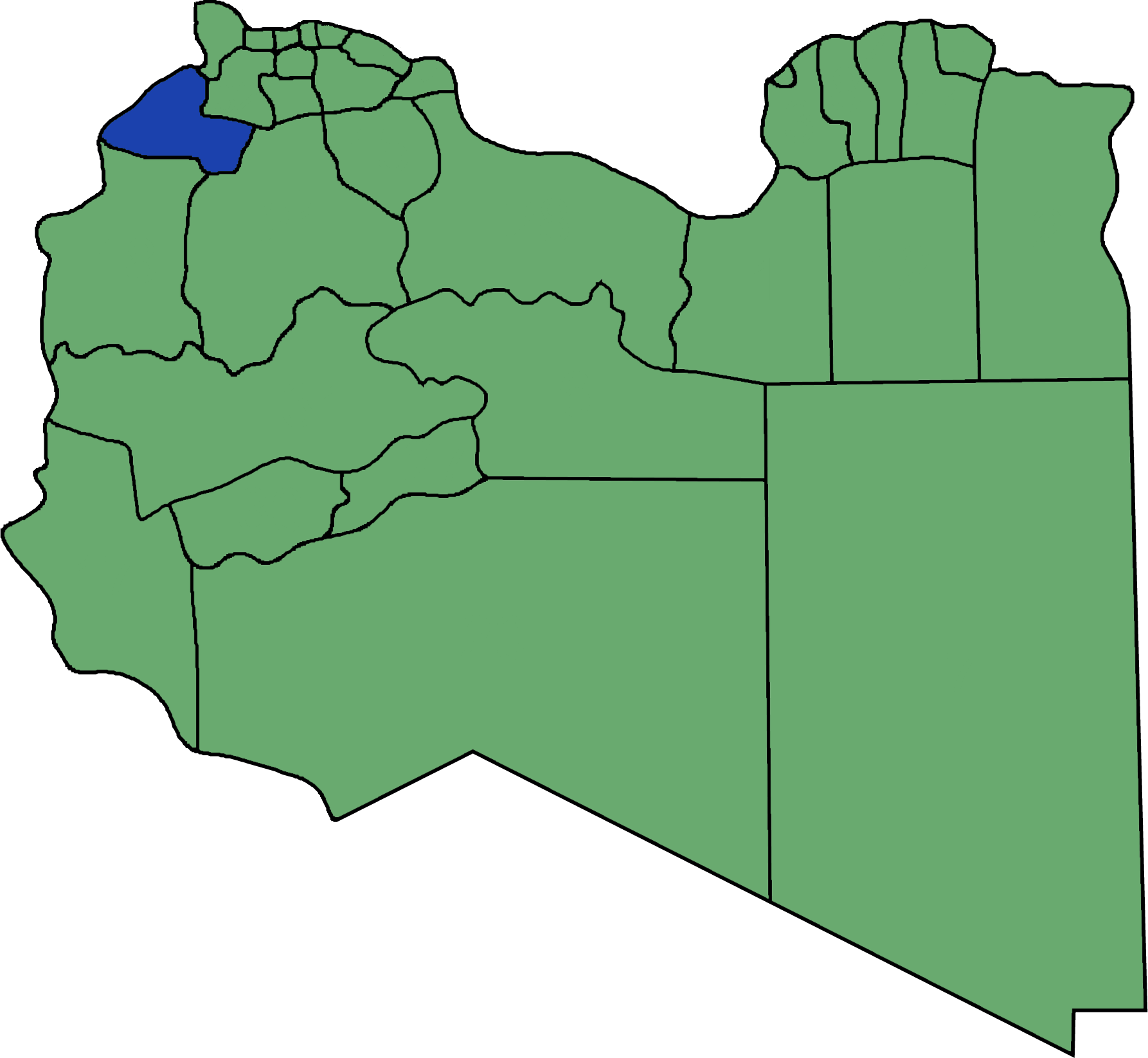 Die neuen Gemeinden (Munizipien) in Libyen. Nalut hervorgehoben.